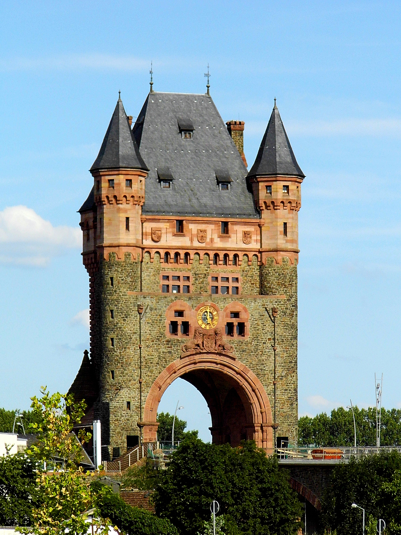 Der Nibelungenturm in Worms